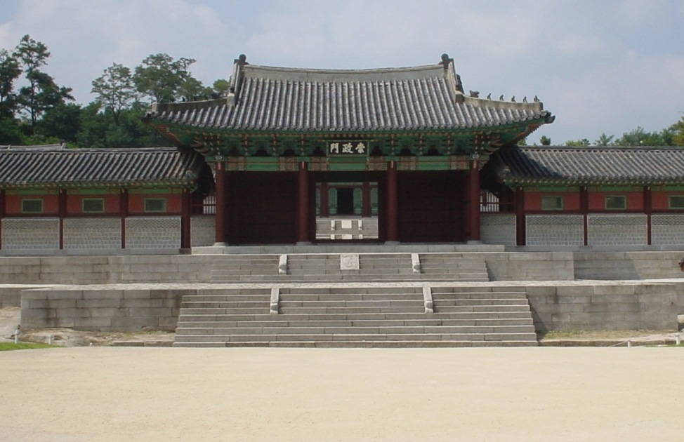 분류:경희궁